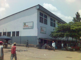 UPAK,_à_Ngriri-ngriri.jpg